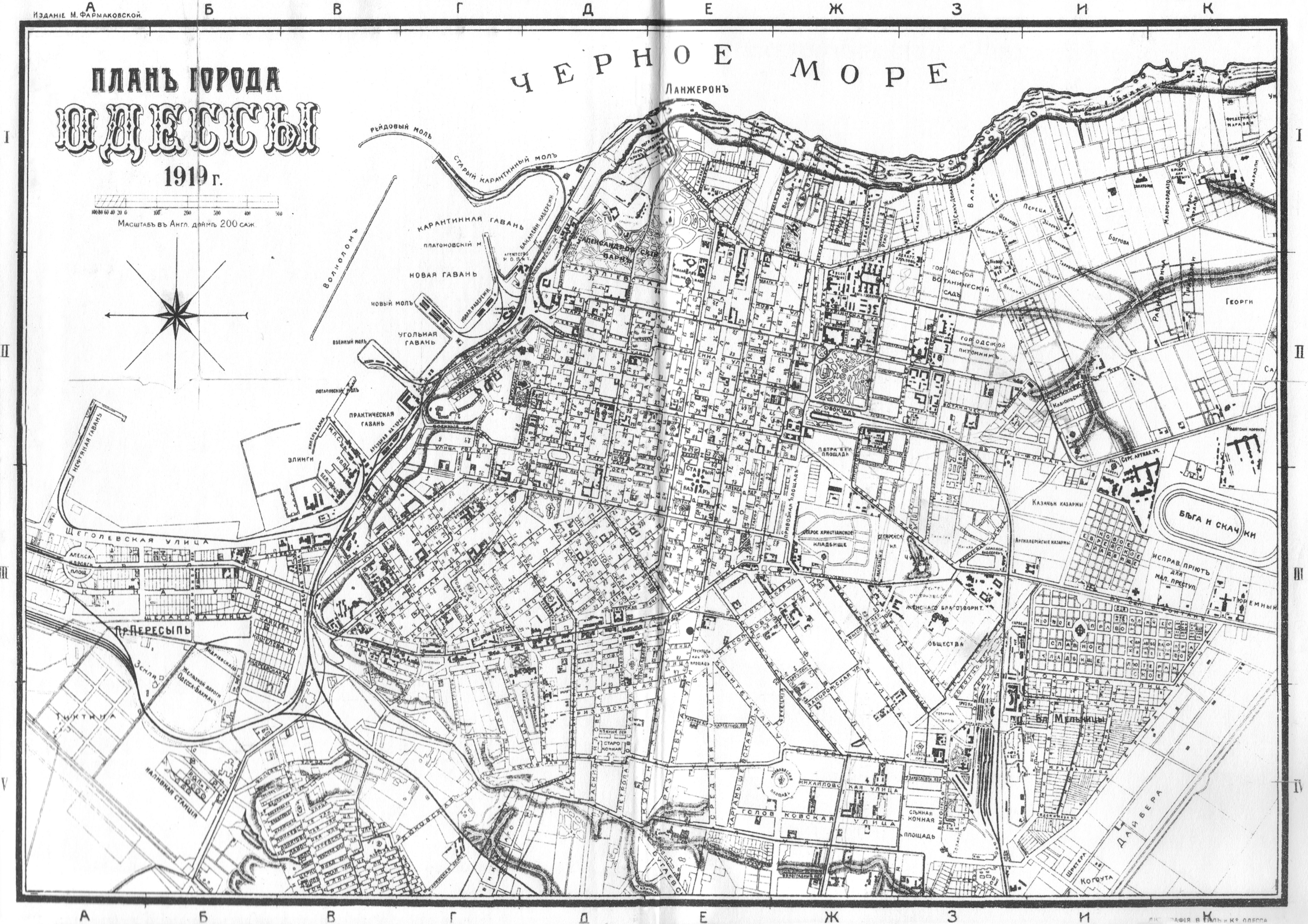 План города Одессы 1919 года. Масштаб в 1 дюйме - 200 саженей. Издание М. Фармаковской. Типография В. Тиль и Ко, Одесса.